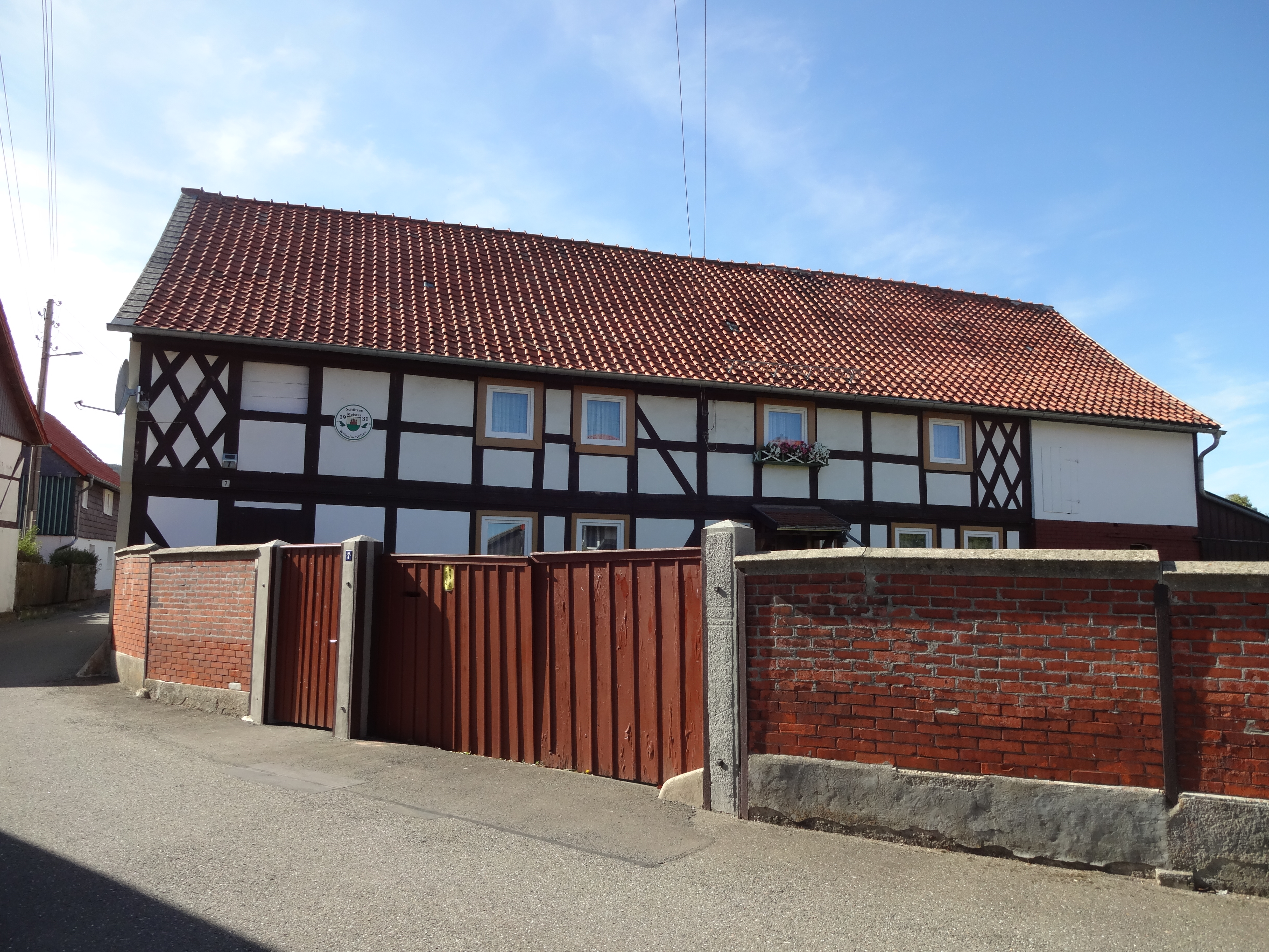 denkmalgeschütztes Wohnhaus in der Backhausgasse 7 in Drübeck